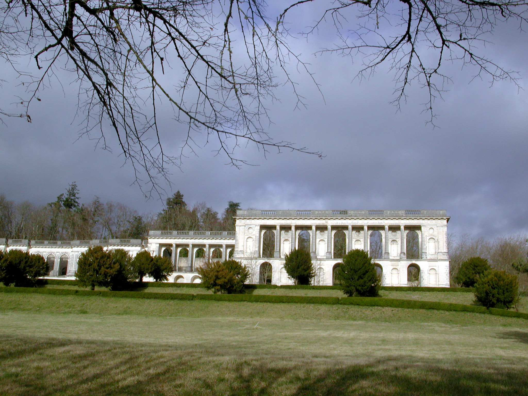 Façade du château de la Mercerie près de Villebois-Lavalette, le "Versailles" charentais, France